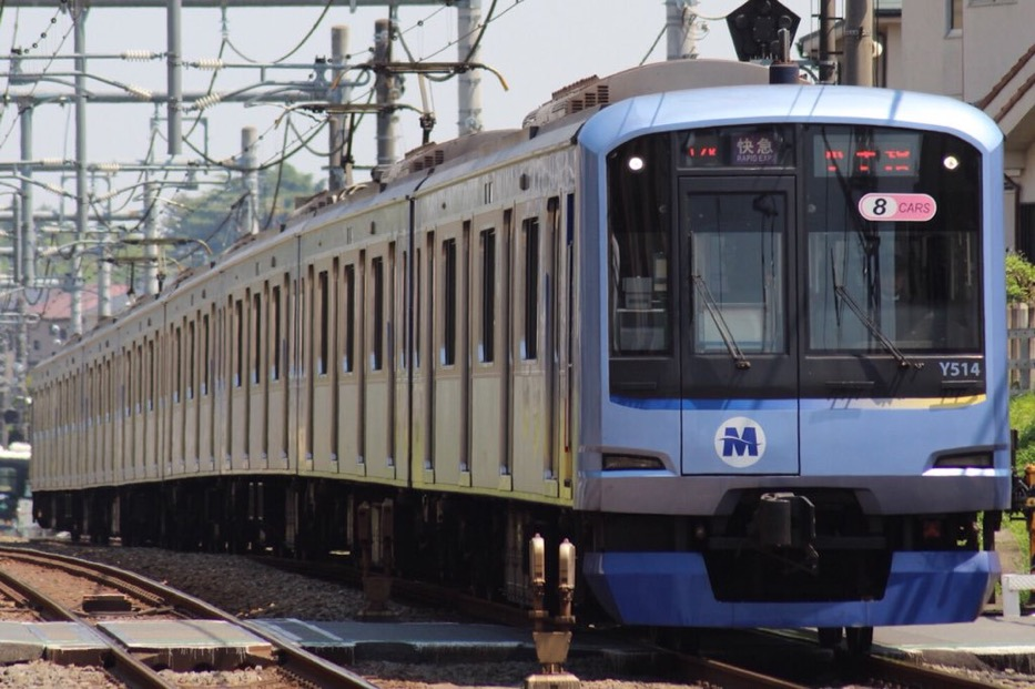 横浜高速鉄道Y500系Y514F 西武池袋線清瀬～秋津